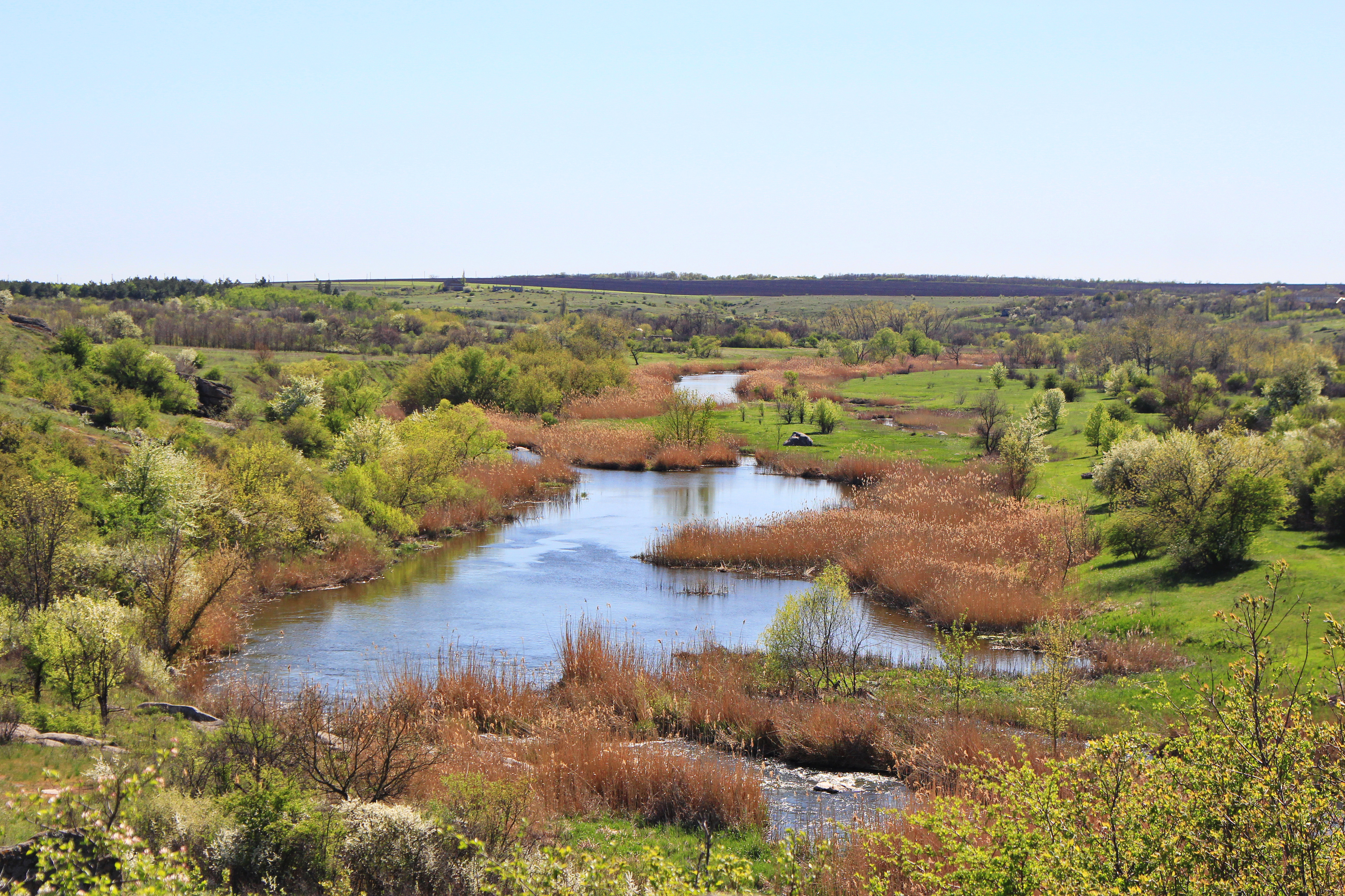 «Монастирище», Устинівський р-н, с. Завтурове